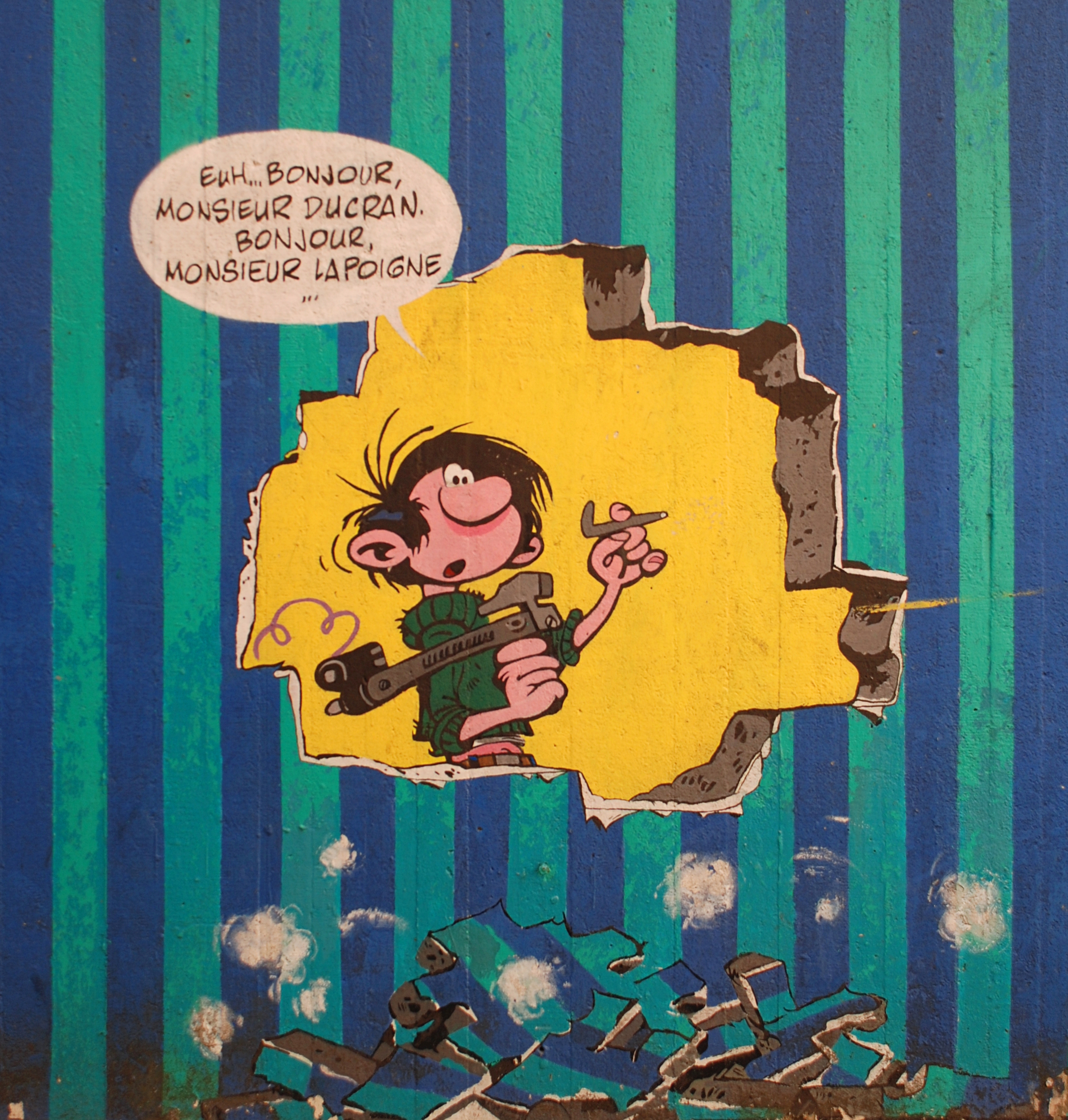 Belgique - Louvain-la-Neuve - Rue des Wallons - peinture murale de la rampe inclinée This photo of immovable heritage has been taken in the Walloon Region